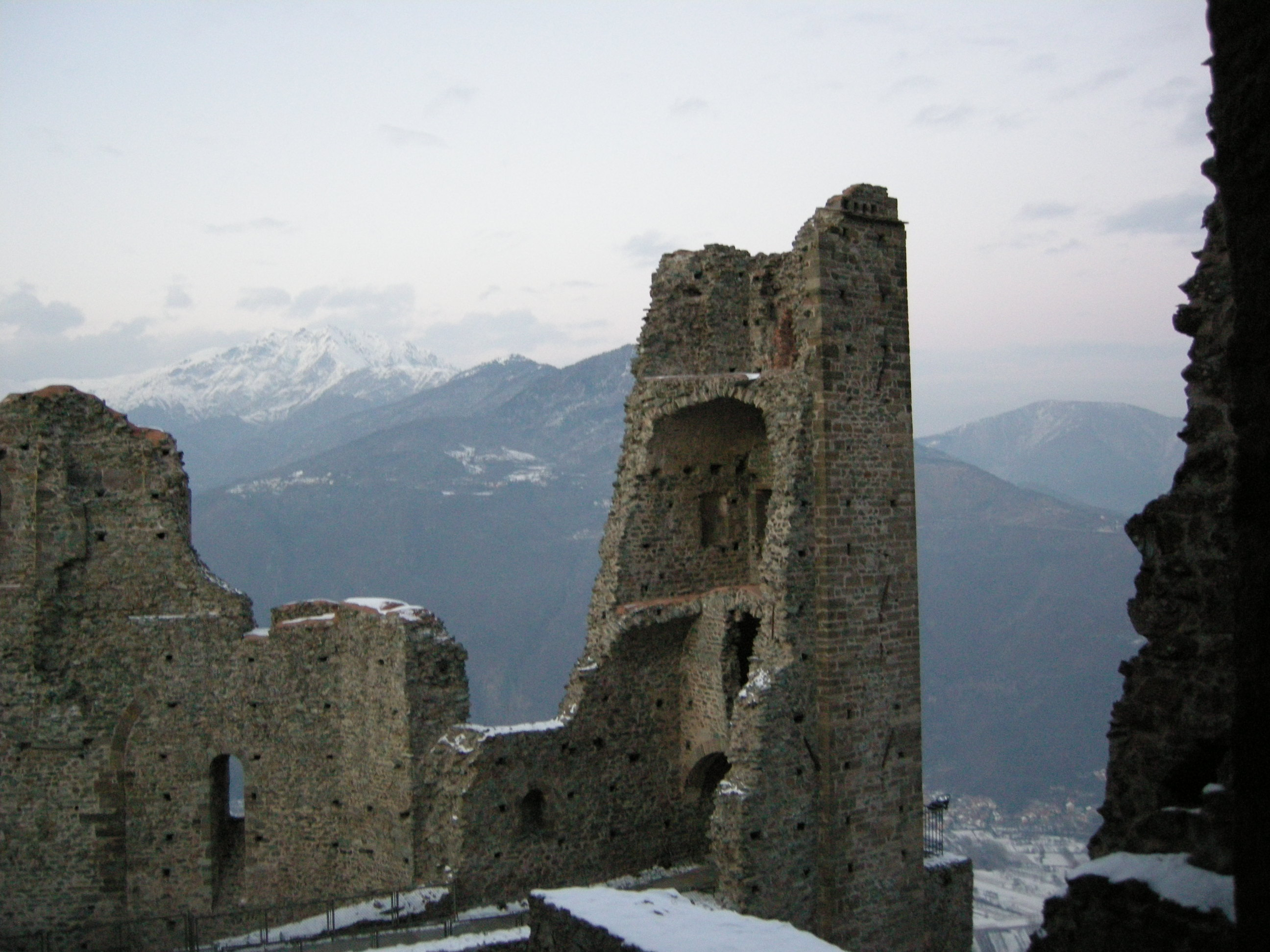 Sacra di san michele 11 torre della bell'alda